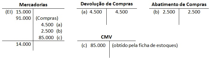 Exemplo retirado do livro para fins acadêmicos, Todos os direitos reservados